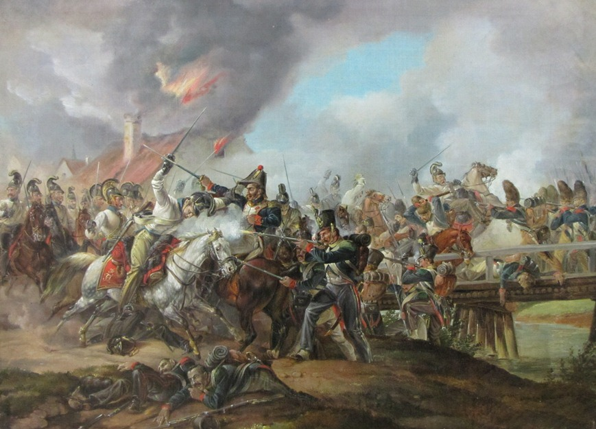 Das Gefecht an der Traunbrücke bei Ebelsberg am 5. Mai 1809 (Fünfter Koalitionskrieg).